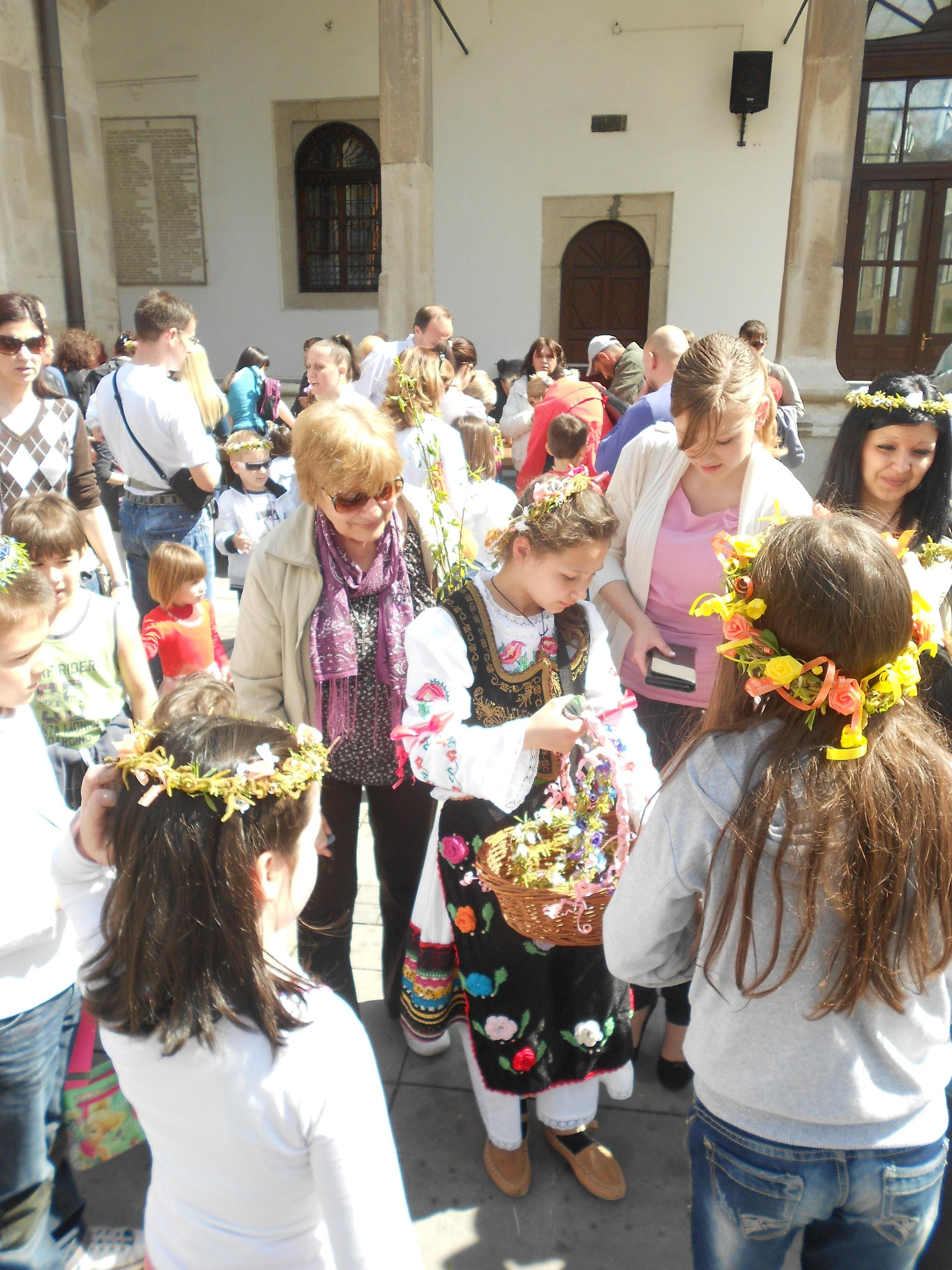 Врбица или Лазарева субота, прослава у Нишу 2012 г. Девојчица у народној ношњи продаје венчиће. Аутор фотографије је Драган Цветковић, Ниш.